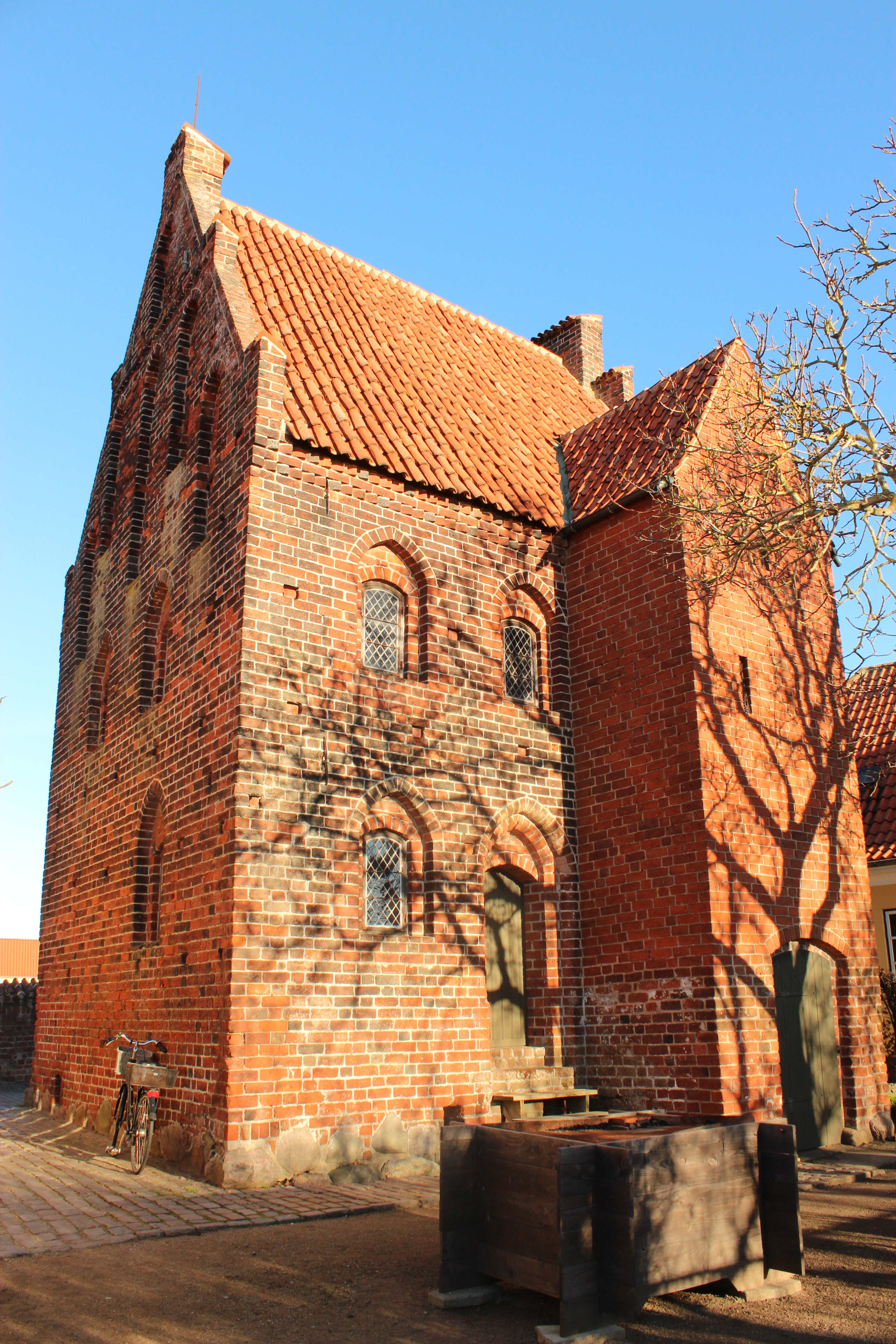 Bagsiden af bygningen med indgang og trapeptårn.